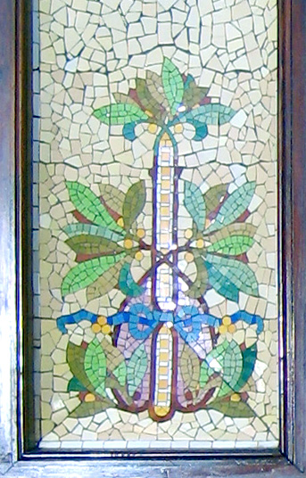 estació nord València